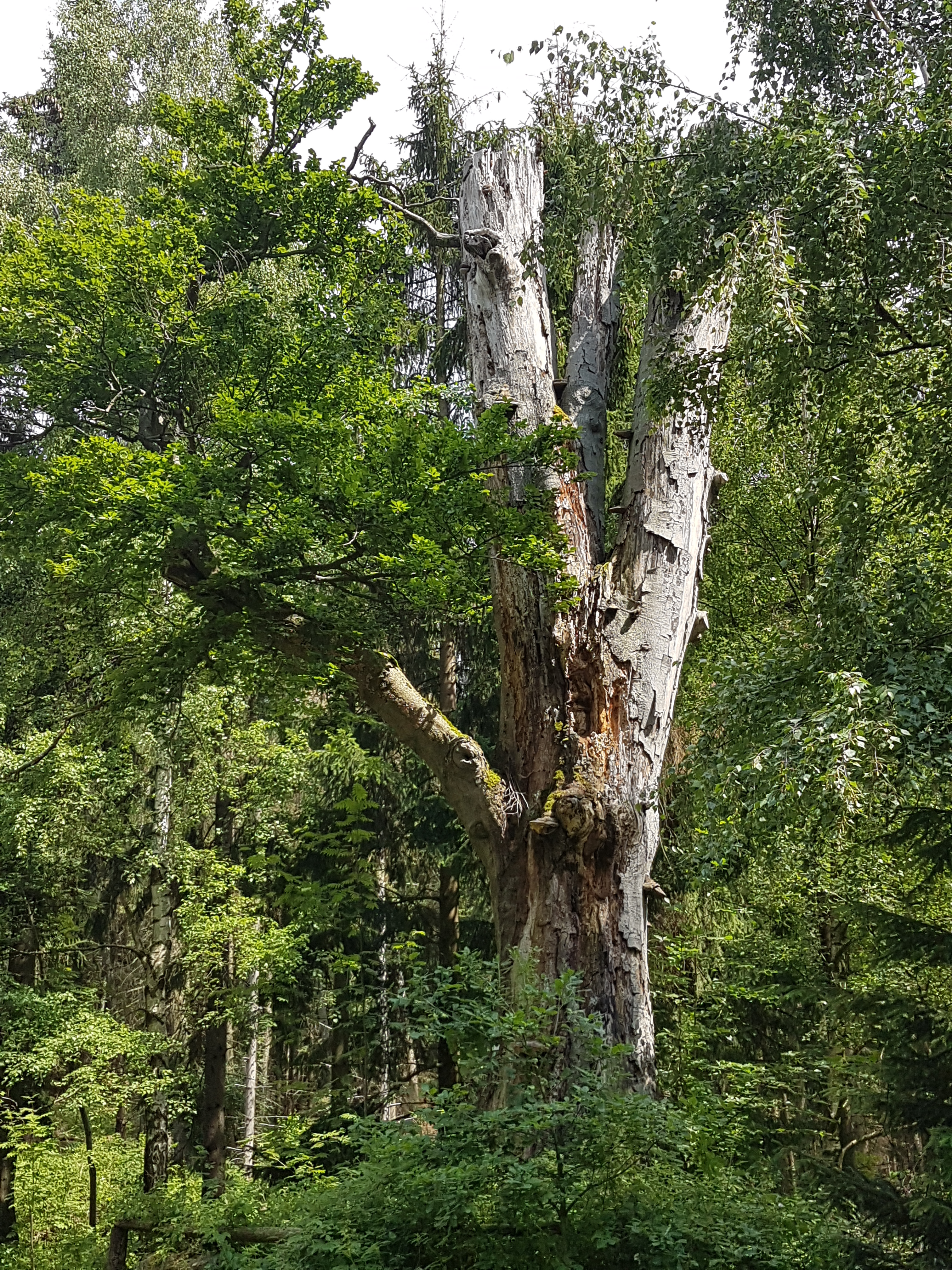 50.1-Mönchsbuche, 21-06-2019